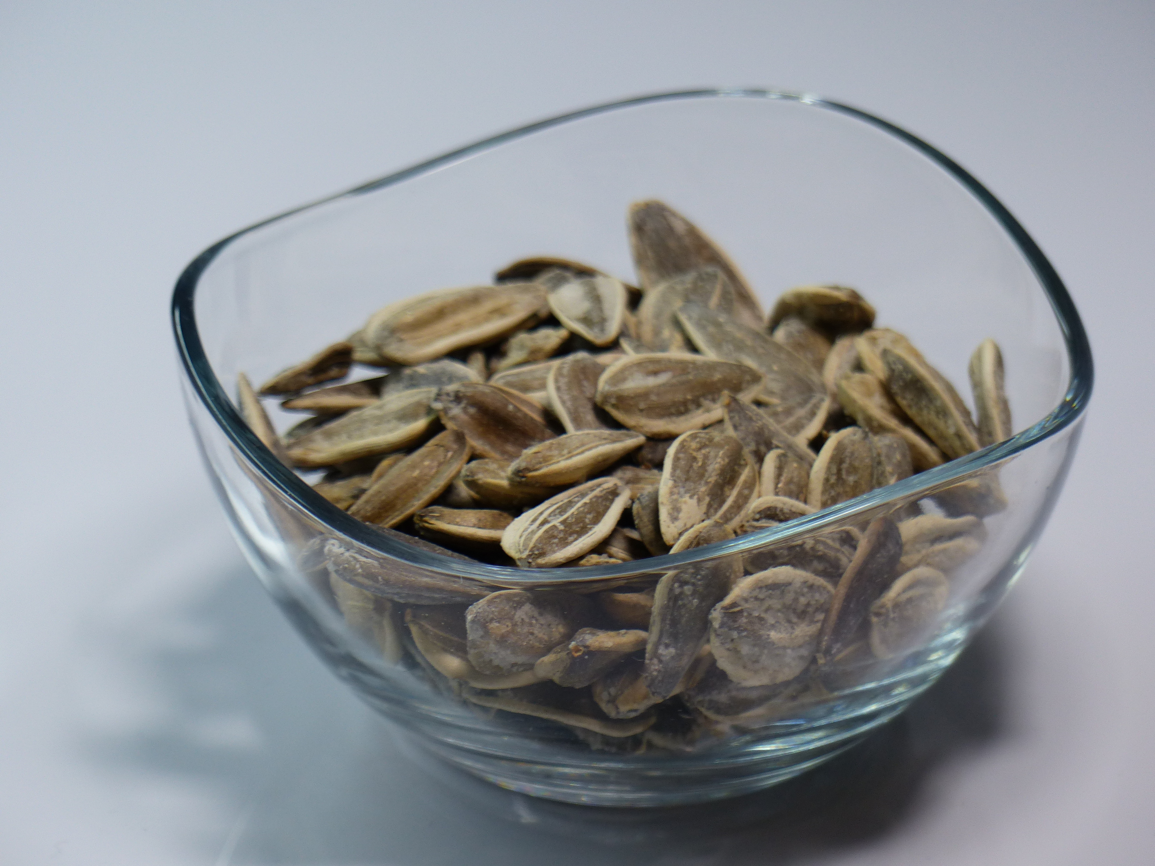 Semillas de girasol, tostadas y con sal